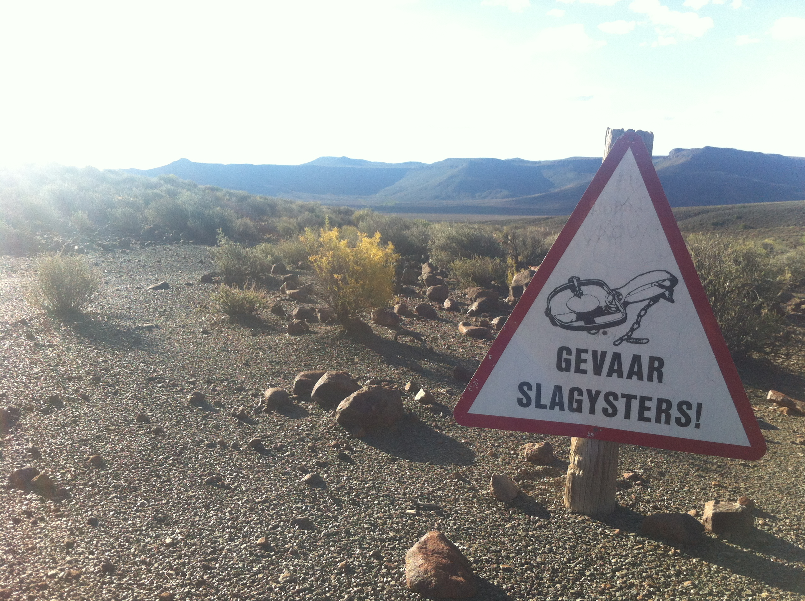 Sign in